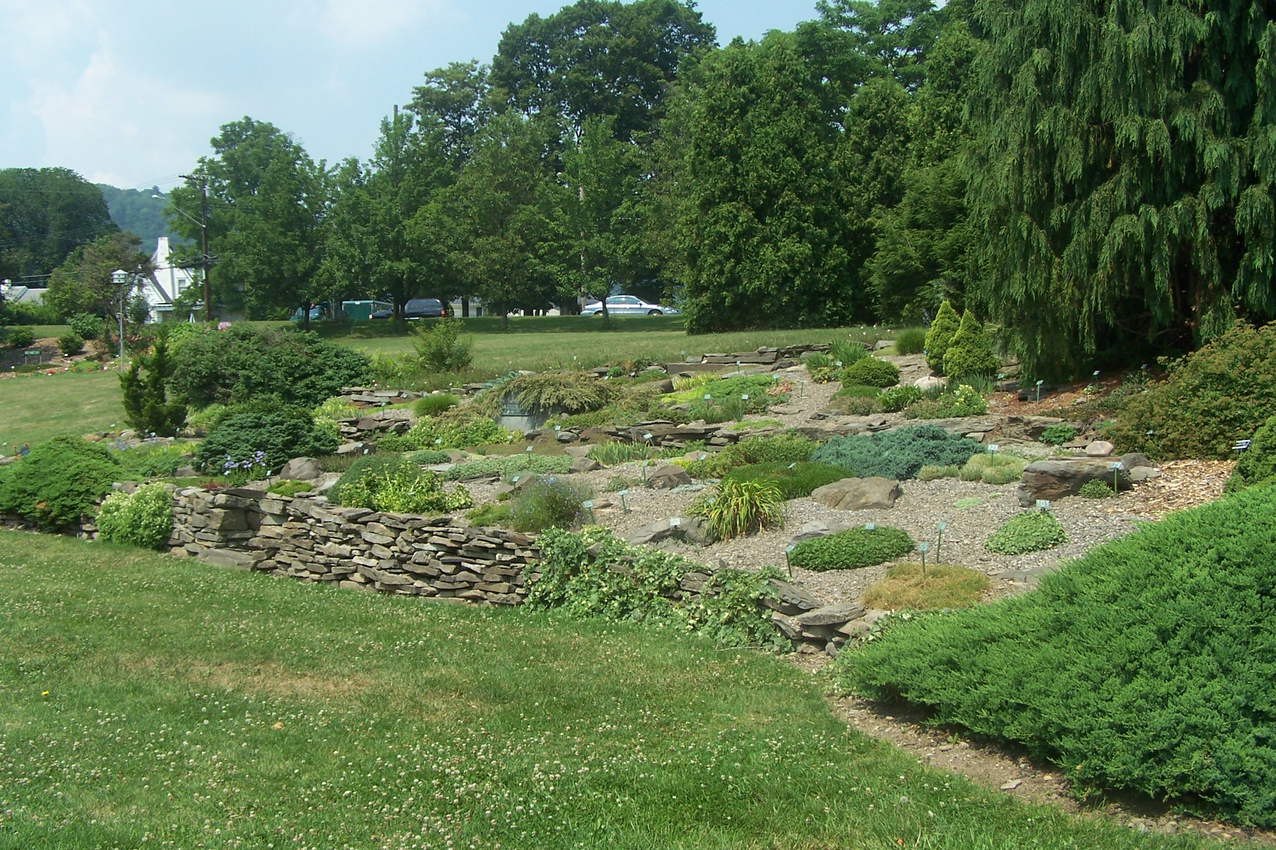 Rock garden, Cutler Botanic Garden